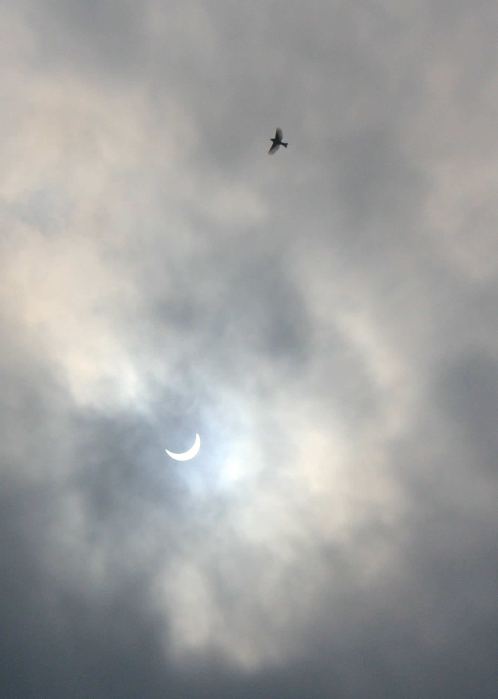 éclipse du 20 mars 2015 à Lorient, France, 10H28